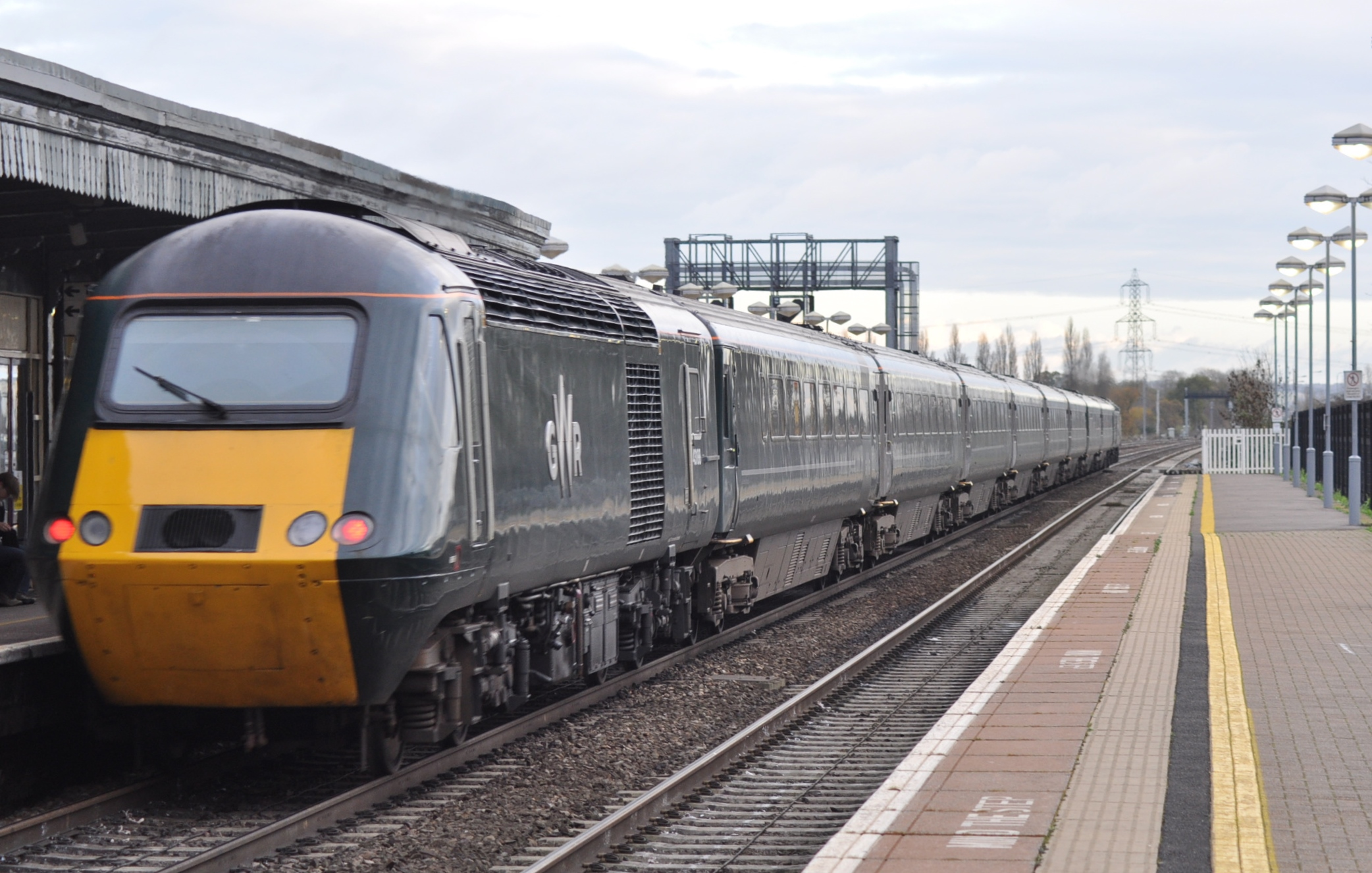 43188 GWR